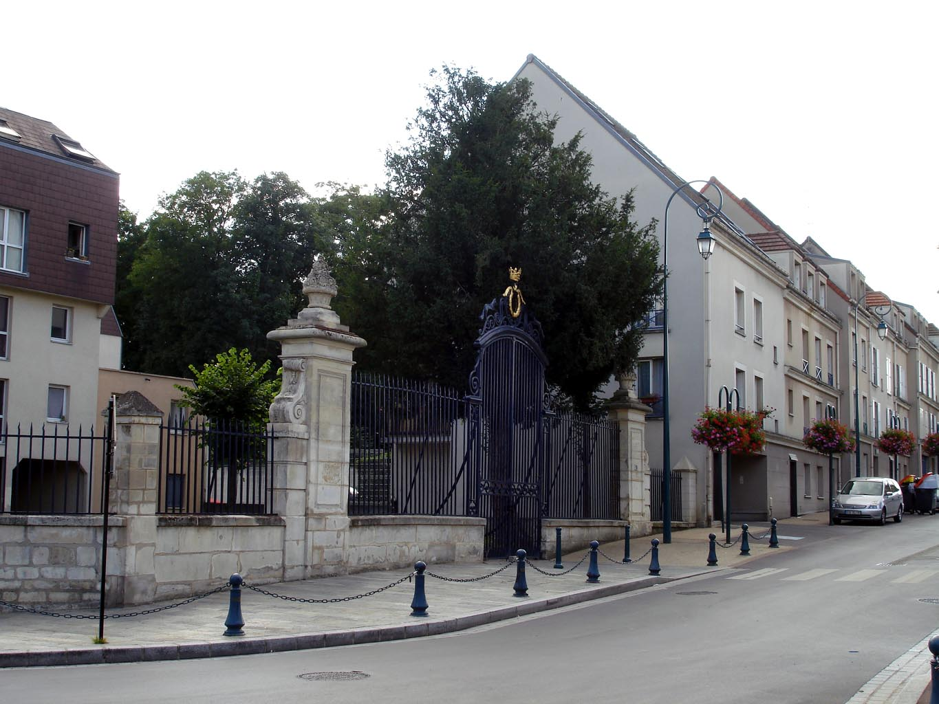 Clôture du château (disparu) à Garges-lès-Gonesse (Val-d'Oise), France. Rue de Verdun, Vieux-Pays